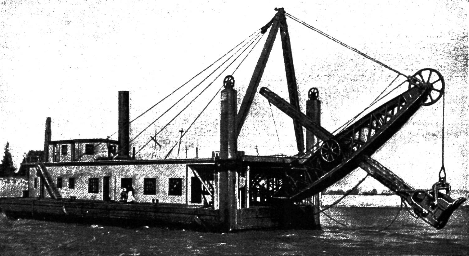 Original: Löffelbagger "Pan American" der Bucyrus Co., South Milwaukee, Wisc. U.S.A. "Der Löffelbagger »Pan American« der Bucyrus Co. (Fig. 2) besitzt in seiner Schaufel einen Fassungsraum von 6,3 cbm und wiegt dieselbe mit Stiel 161. Er macht bei 7,62 m Wassertiefe alle 40 Sekunden einen Hub und leistet demnach rund 4000 cbm in 10 Stunden. Der Löffel ist an einem Drahtseil aufgehängt. Um den Bagger von dem Gewicht der Schaufel nebst Stiel zu entlasten und zugleich den Prahm an der Baggerstelle festzuhalten, sind an dem Baggerende desselben zwei Pfähle vorgesehen, die mittels Drahtseilen auf den Grund niedergedrückt bezw. zum Verholen hochgezogen werden. – Die Löffelbagger eignen sich am besten für harten Boden und bei beengtem Raum. Sie beanspruchen bei dauerndem Betrieb etwa 0,30 ℳ. Betriebskosten pro Kubikmeter Erde."